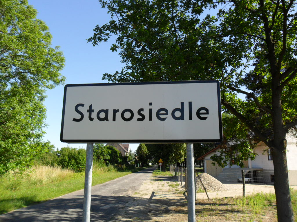 Starosiedle